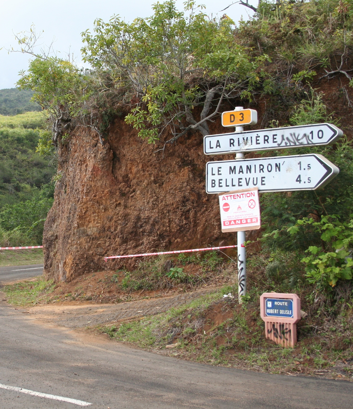 Un panneau routier indiquant La Rivière à la Réunion.